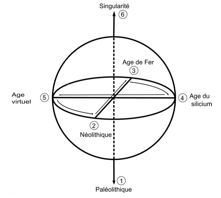 Application de la Structure absolue à l'histoire de l'humanité.